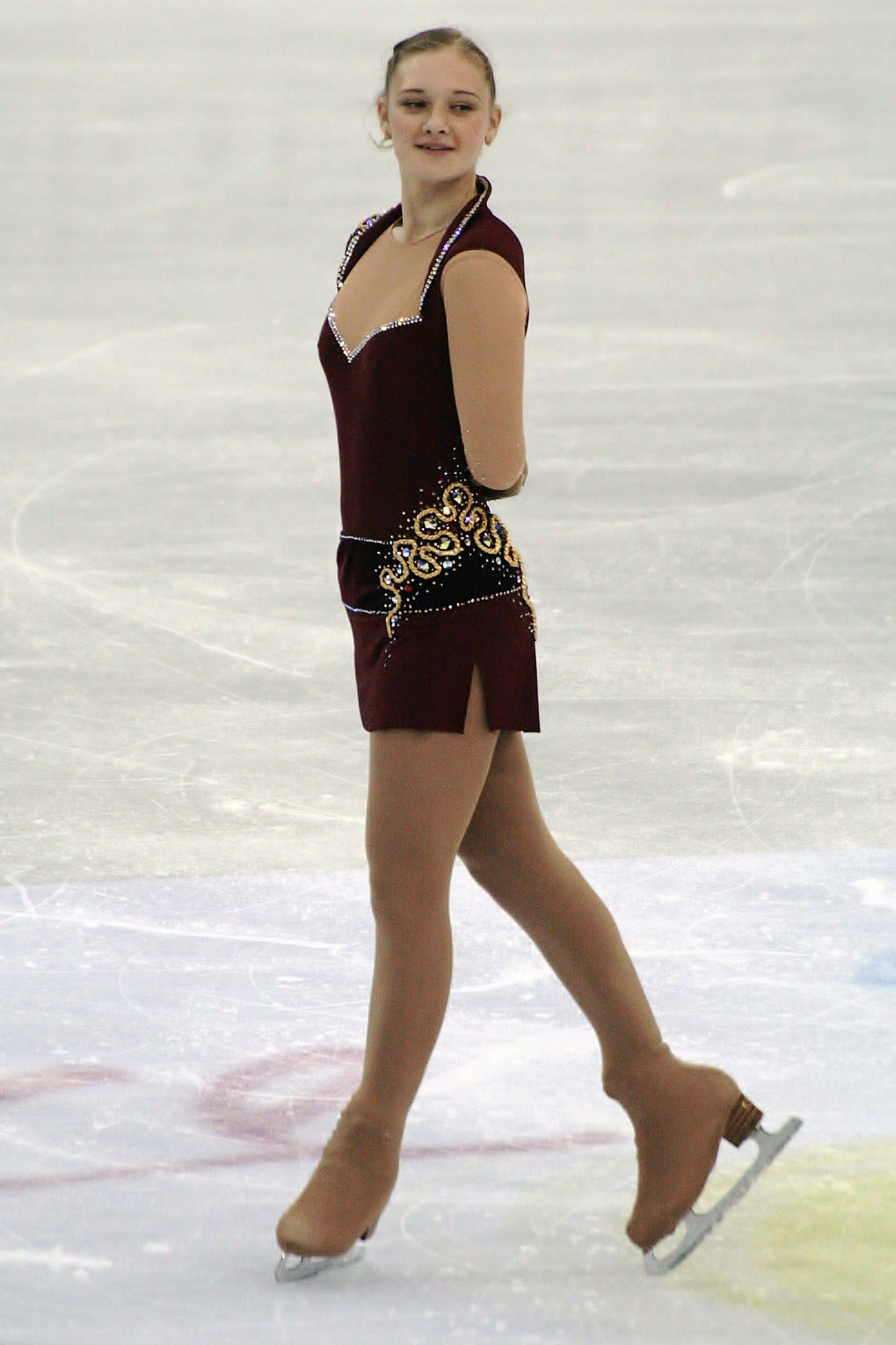 Алина Фёдорова (Латвия) на чемпионате мира по фигурному катанию 2012.